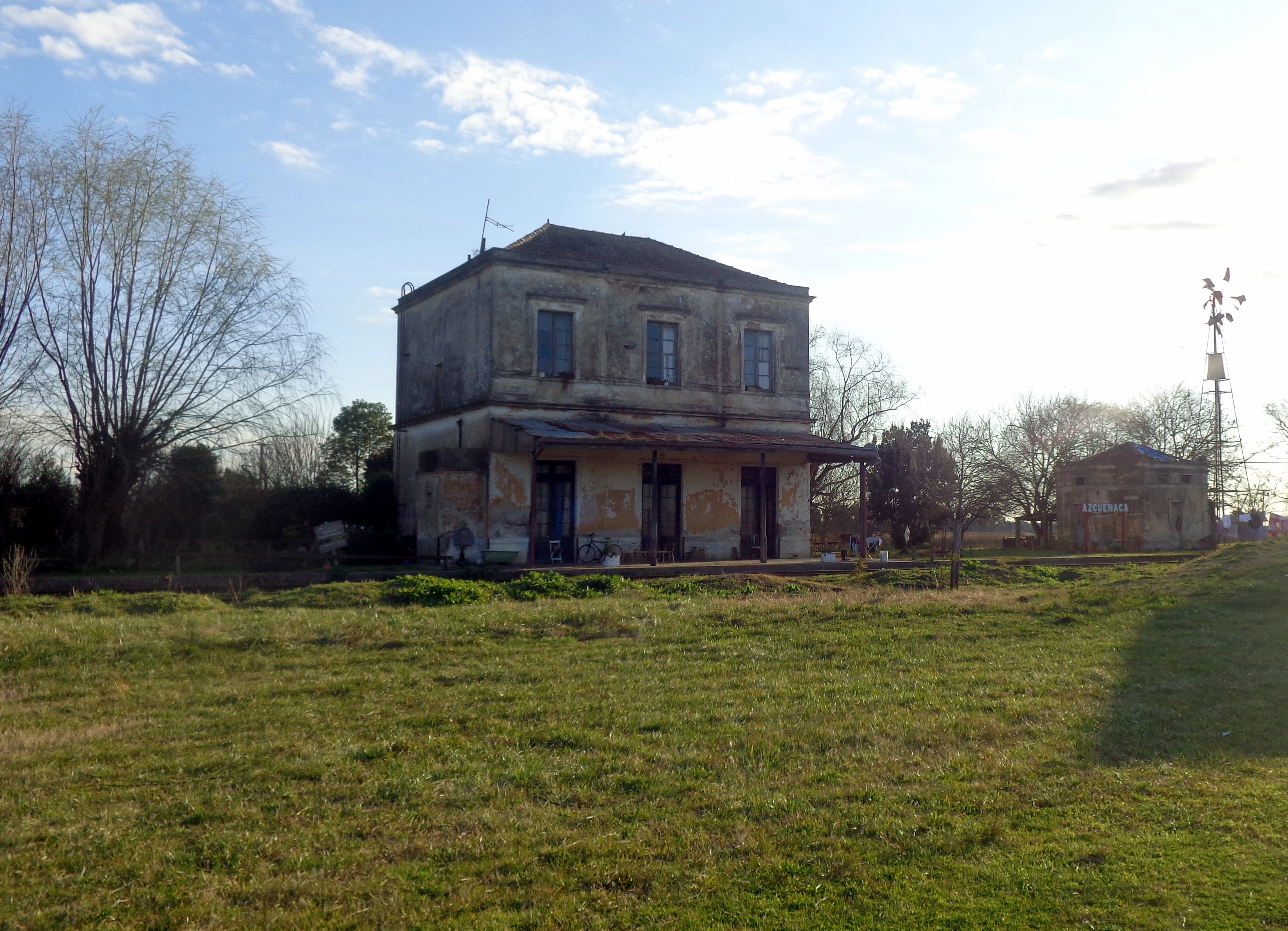 Azcuénaga, Partido de San Andrés de Giles, Provincia de Buenos Aires, Argentina.